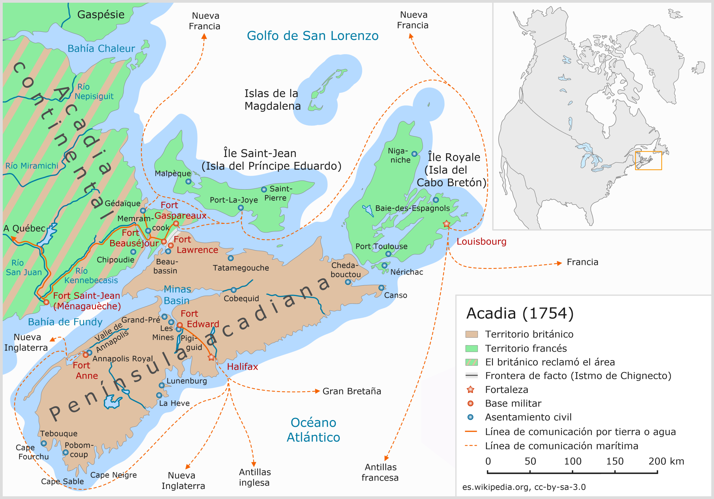 Acadia (1754)